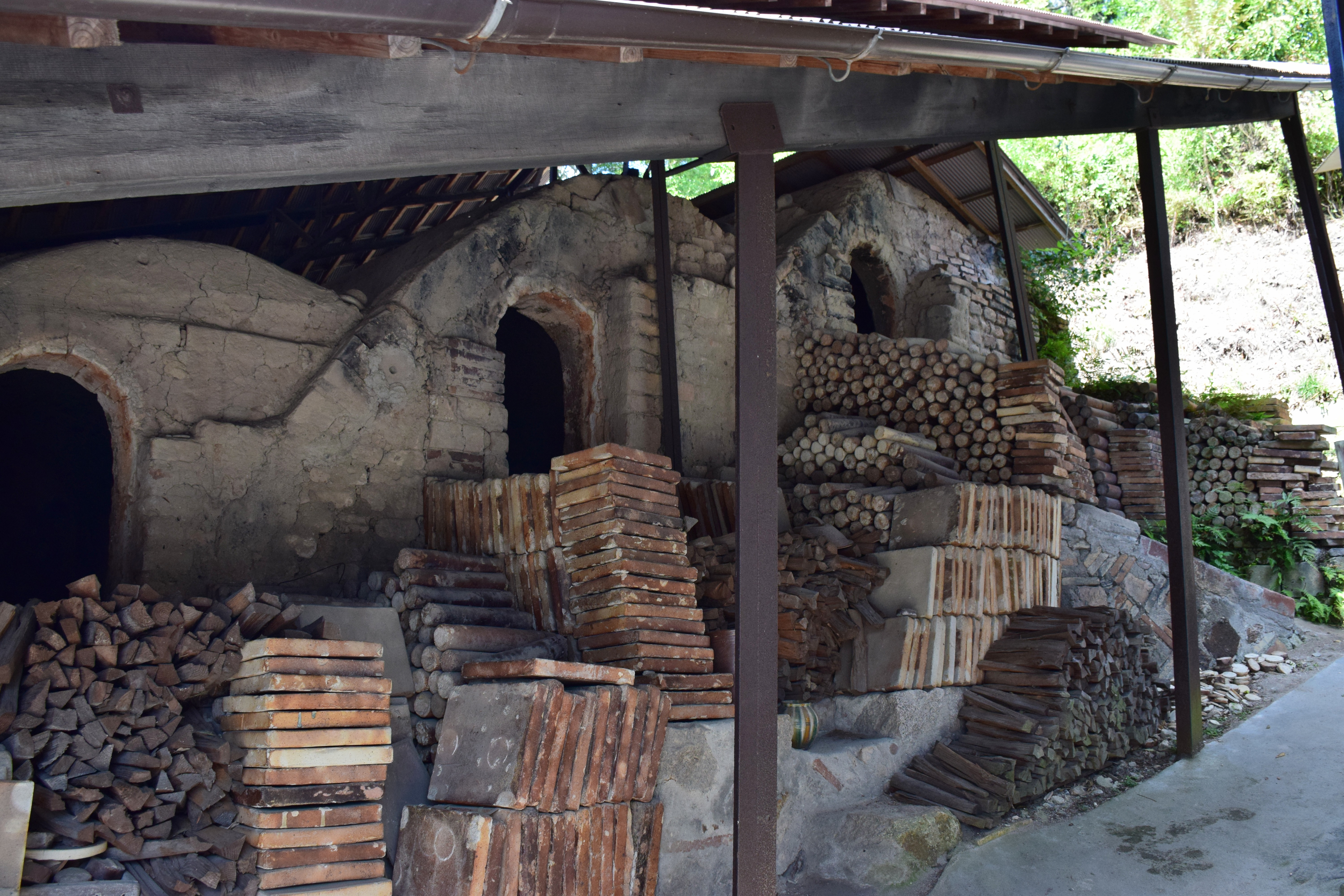 窯垣の小径洞本業窯